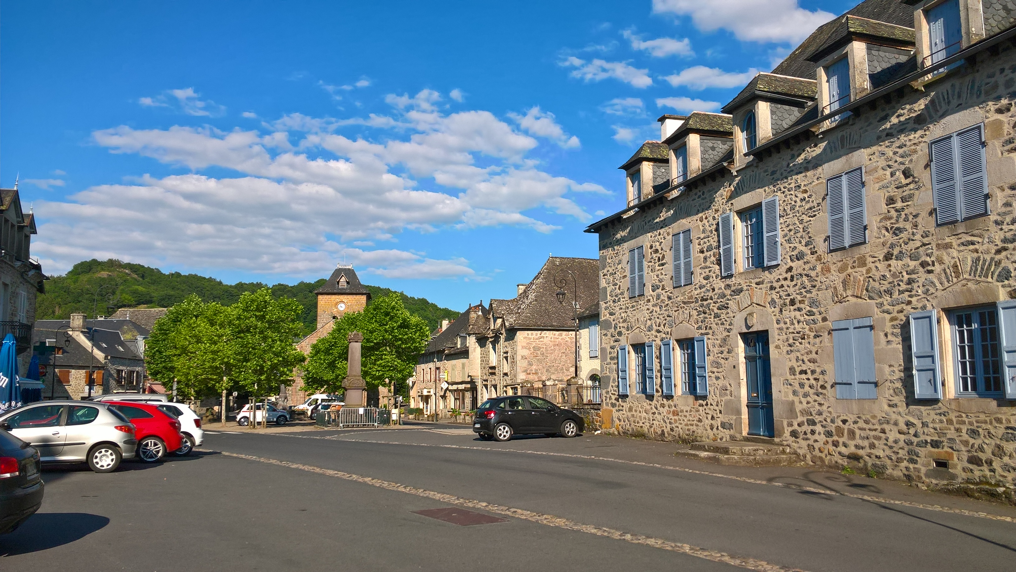 Saignes, centre du bourg.